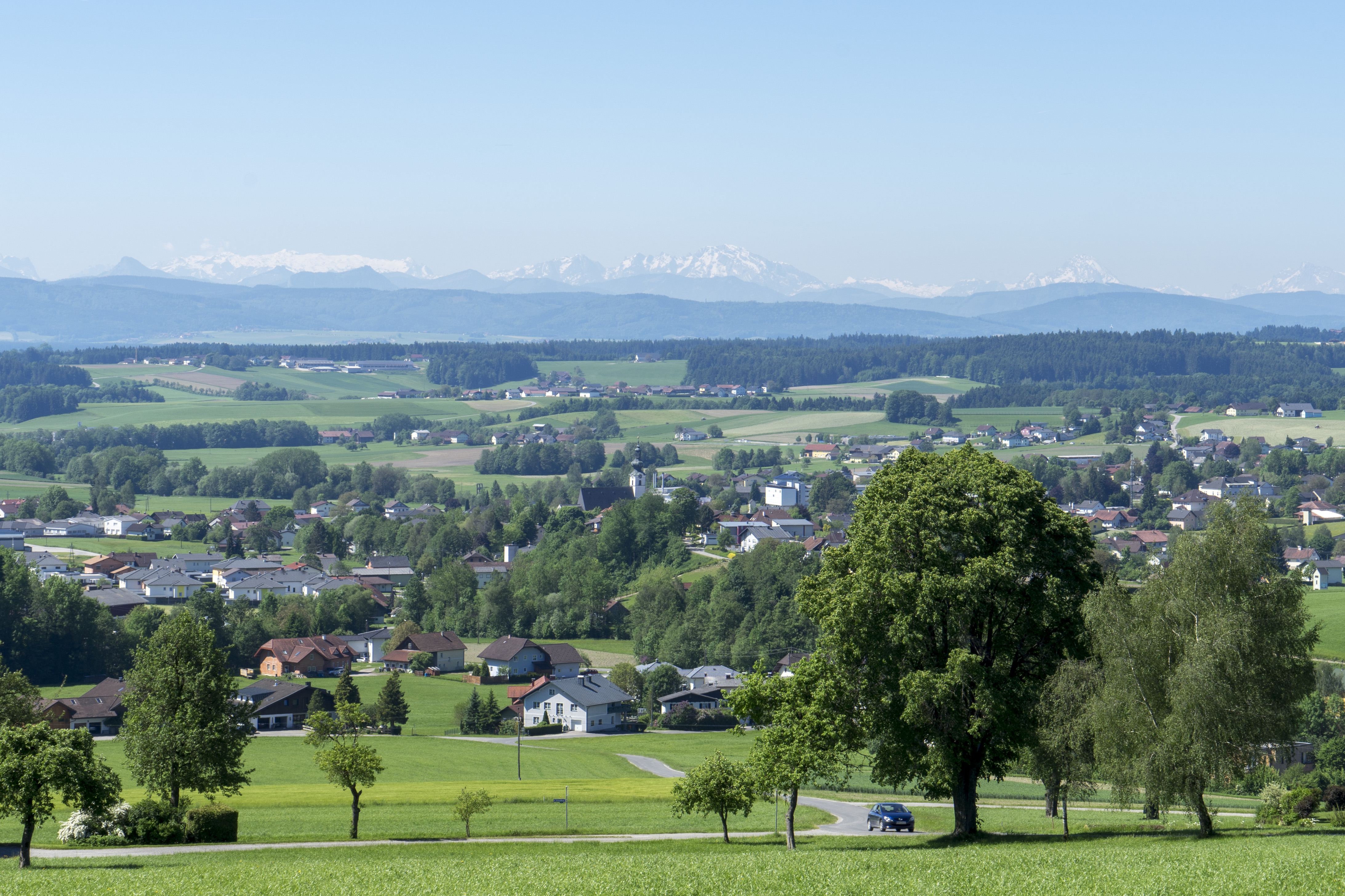 Frankenburg am Hausruck Aussichtsturm